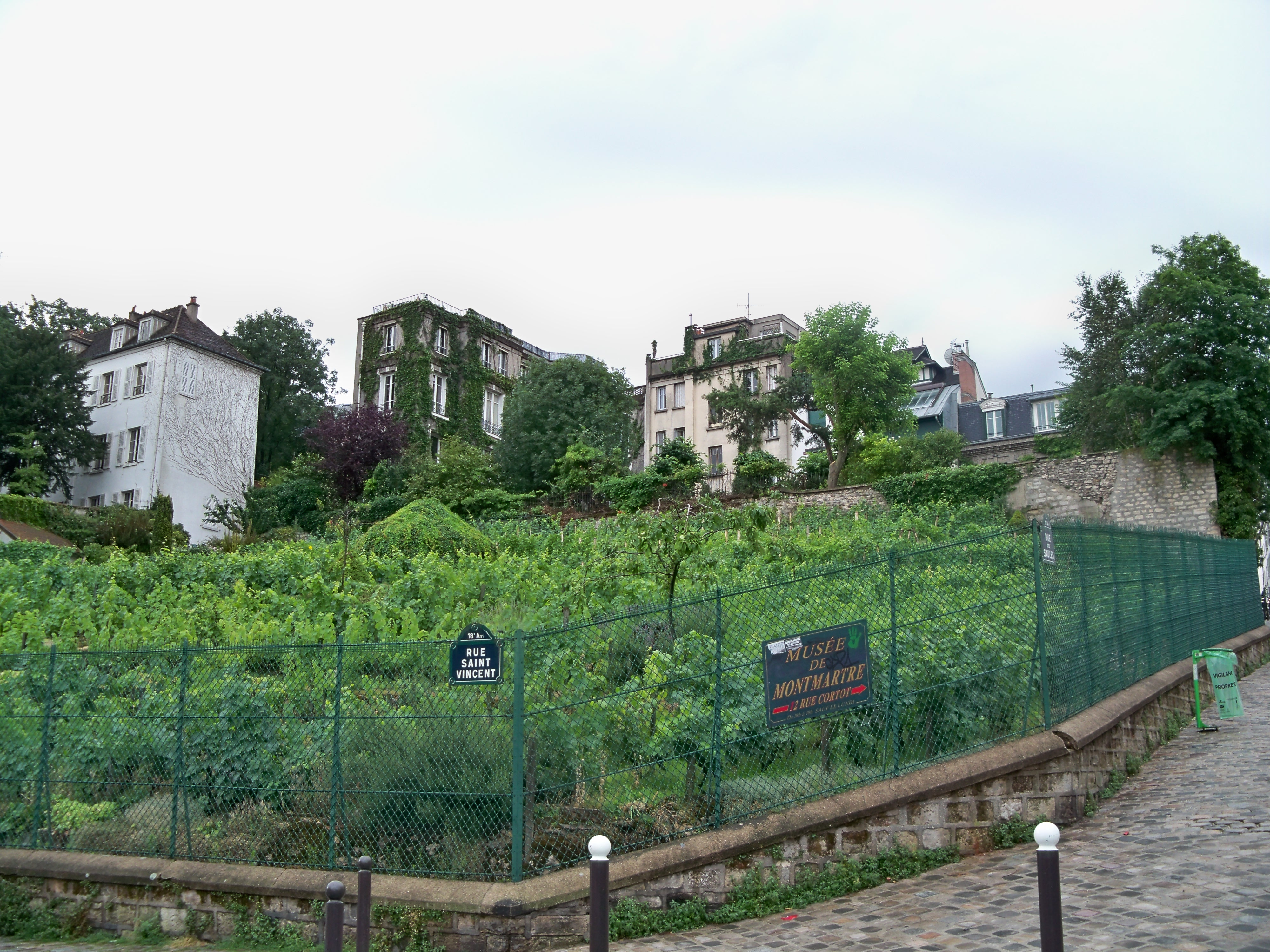 Vignoble à Montmartre, Paris